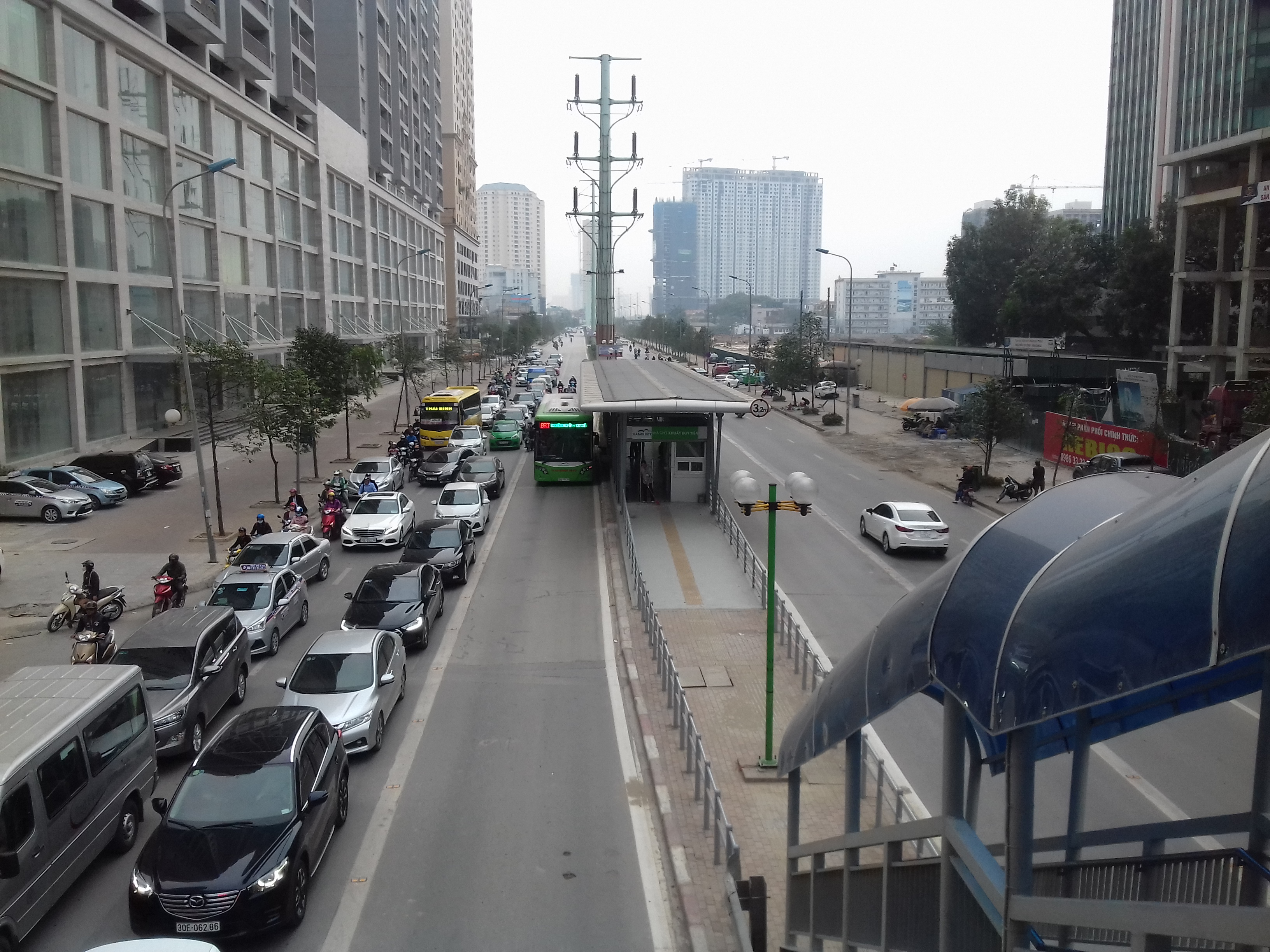 Một xe buýt nhanh BRT Hà Nội đang vào nhà chờ. Ảnh chụp tại khu vực Nhà chờ Khuất Duy Tiến - Ngã 3 Khuất Duy Tiến - Tố Hữu